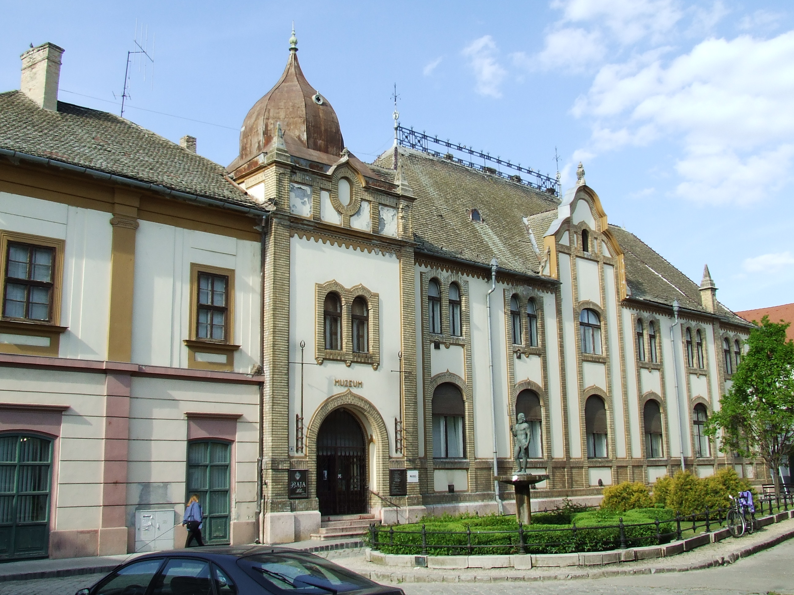 A Türr István Múzeum épülete Baján